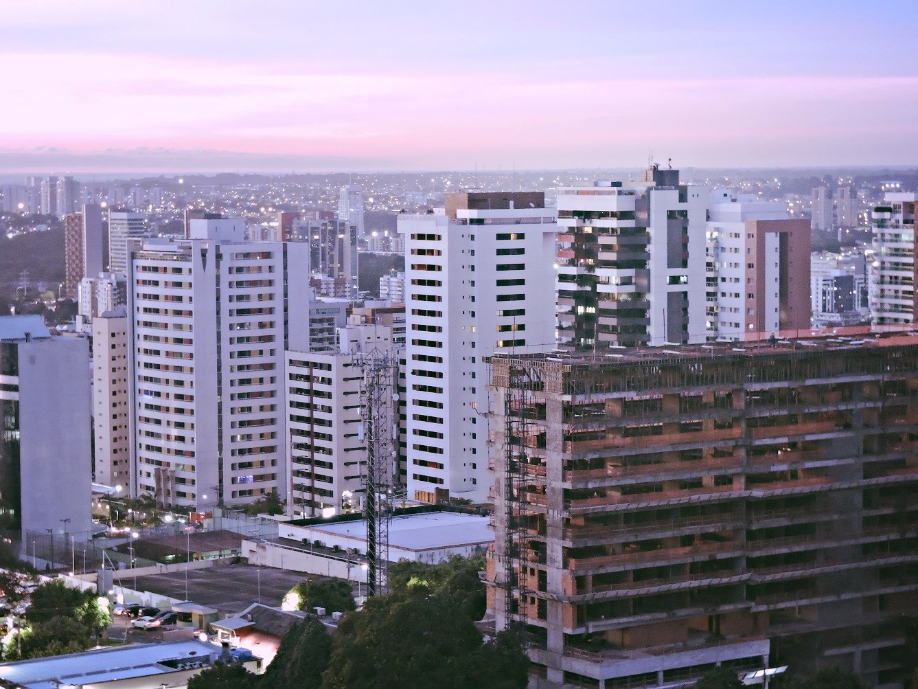 Bairro Adrianópolis, Manaus, Brasil